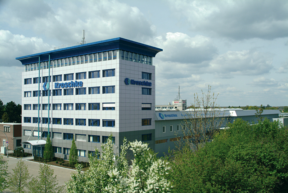 Gebäude der Klaus Kroschke Holding GmbH & Co in Braunschweig Kroschkestraße 1 38112 Braunschweig